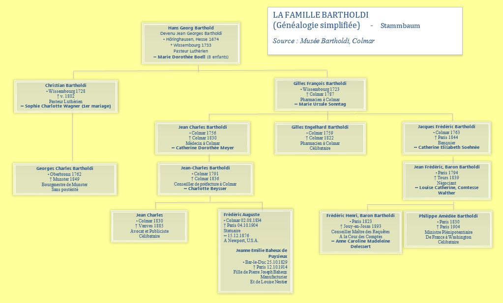 Source : Musée Bartholdi, Colmar